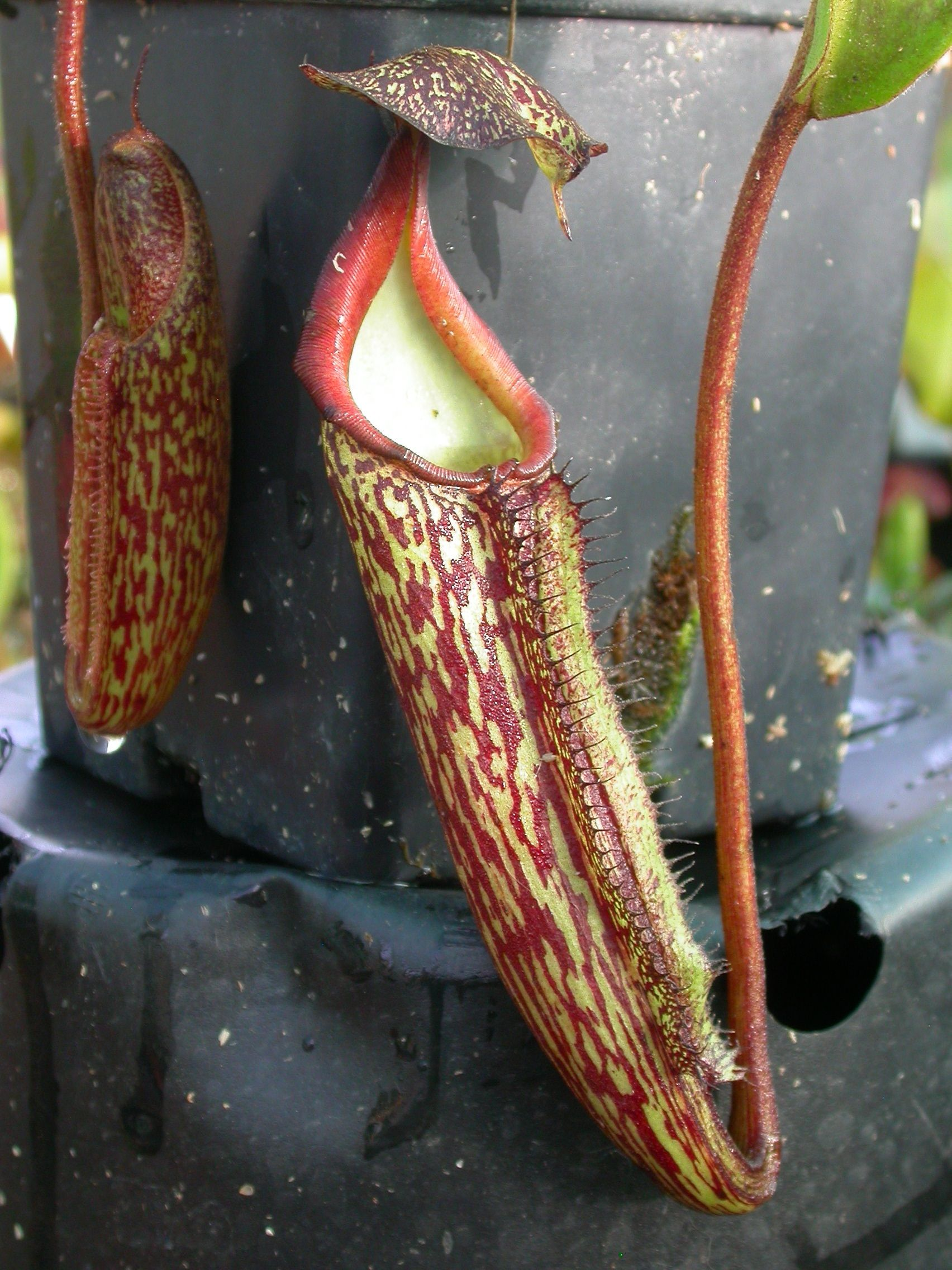 Cultivated N. maxima. -Jeremiah